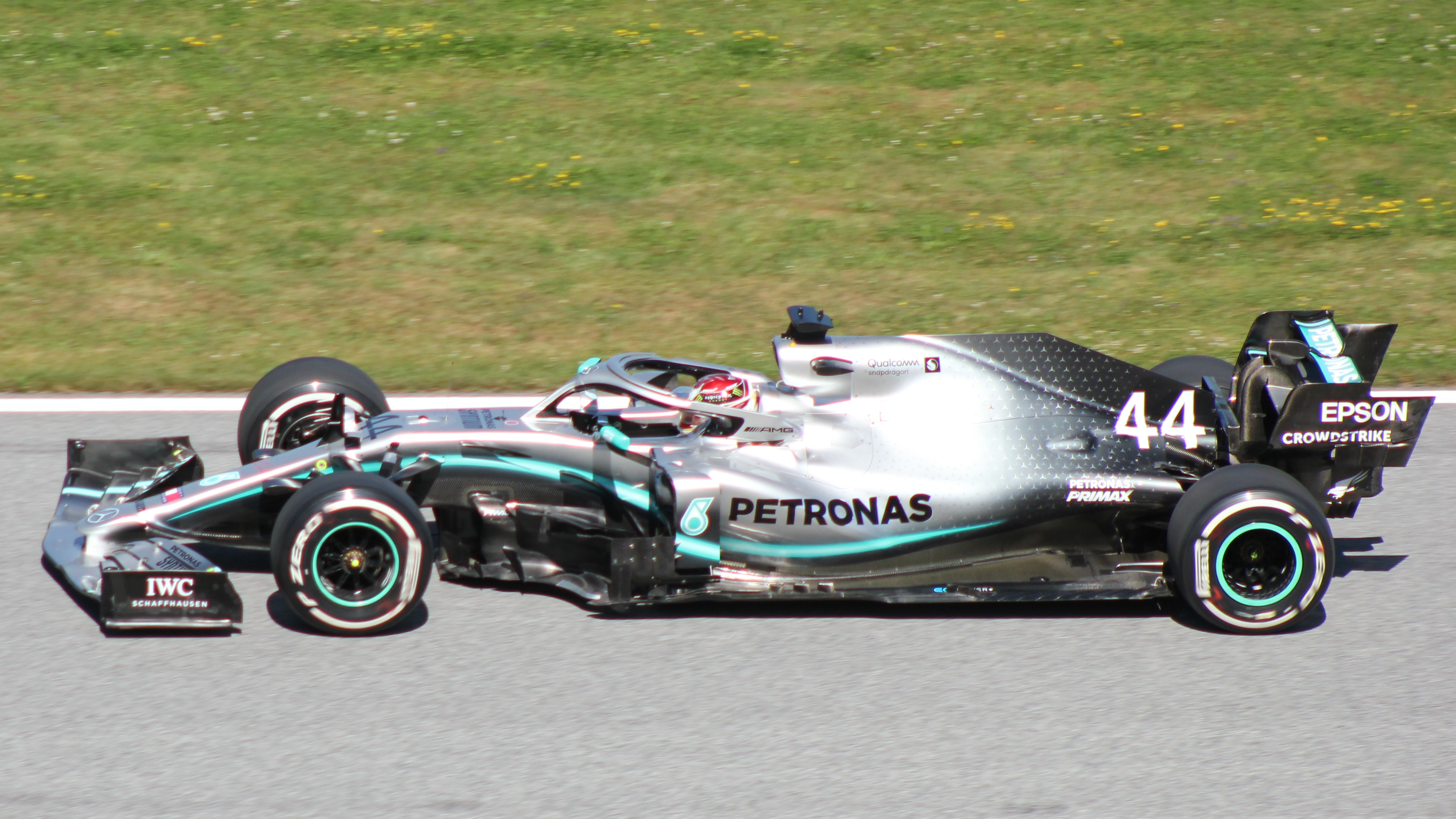 Hamilton beim Rennwochenende in Österreich 2019